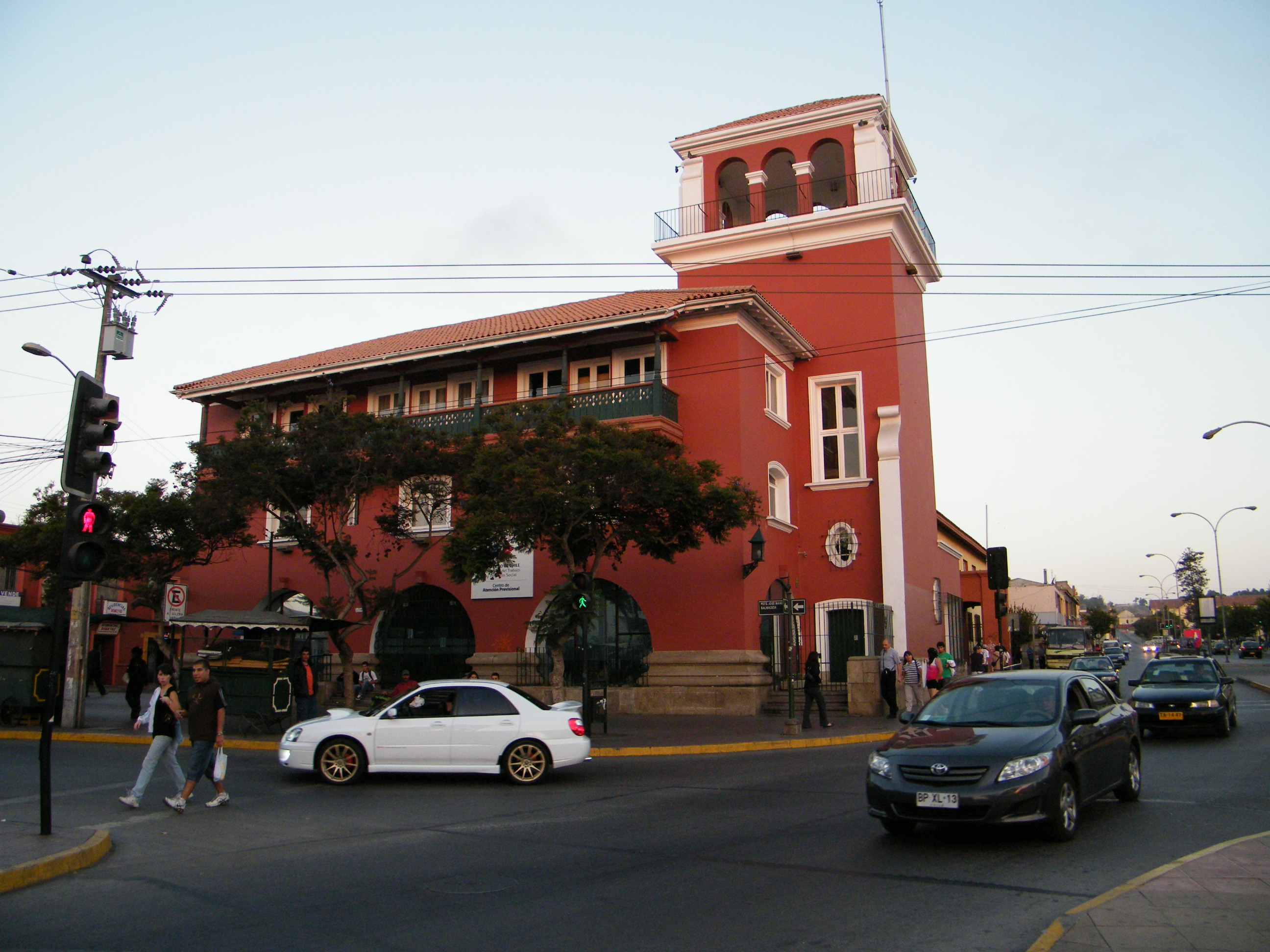 Centro histórico de La Serena. This is a photo of a national monument in Chile: 602